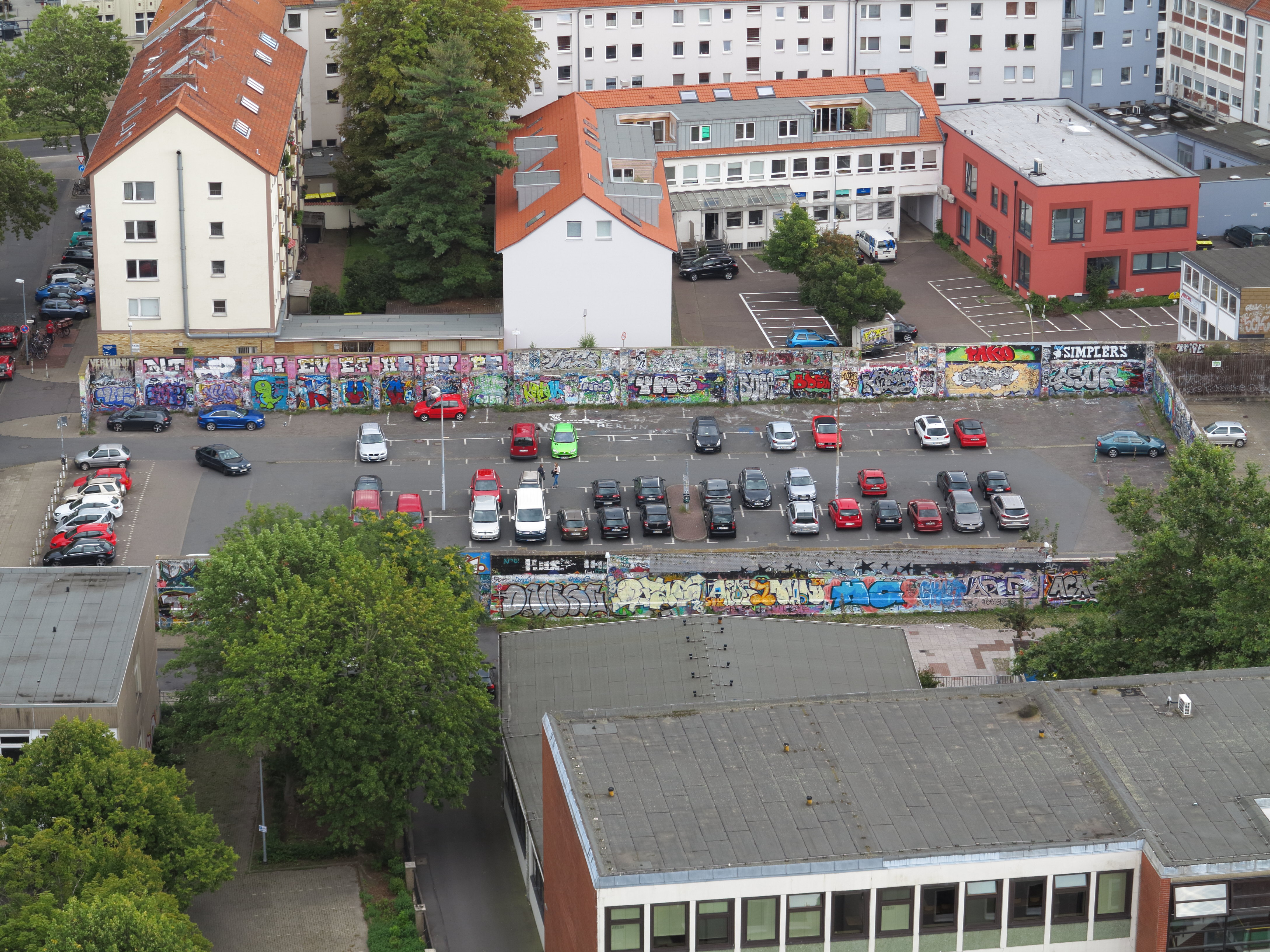 Von der ehemaligen Braunschweiger Markthalle sind nur noch die Grundmauern erhalten. Heute wird das Gelände als Parkplatz genutzt.